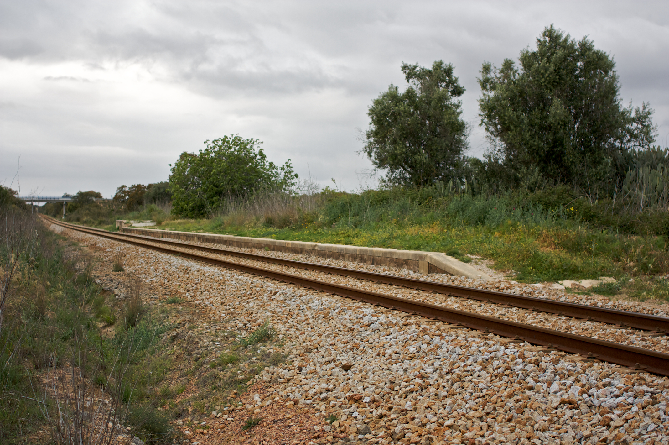 demolido (em parte), e em desuso. Tipo: A Apeadeiro Local: Escoural Linha do Alentejo, PK 83 Data e hora: 13 de Abril de 2009 19h10